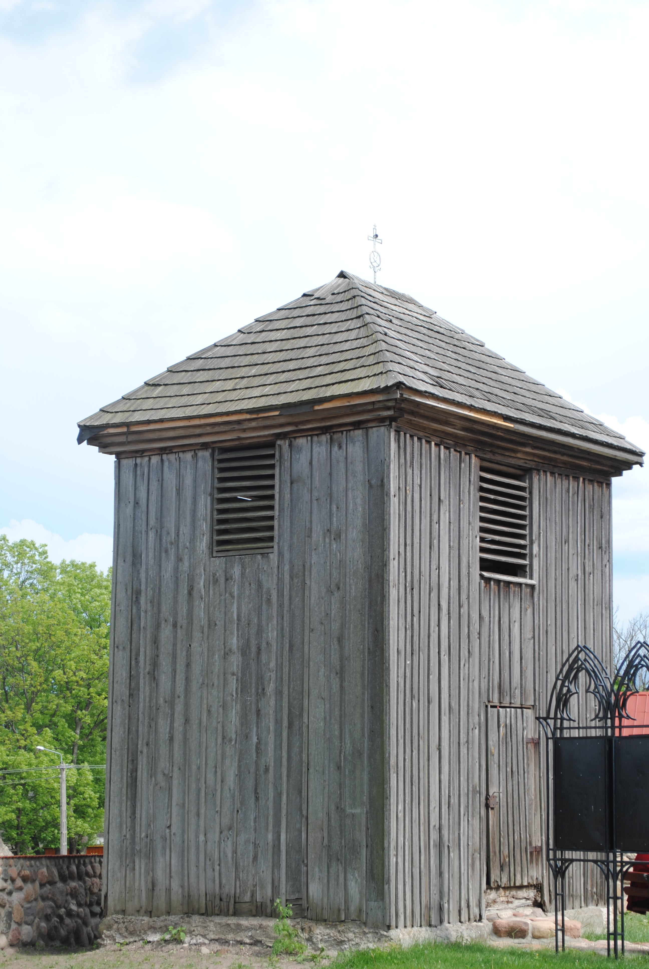 Dzwonnica przykościelna w Niedźwiadnej 12.1964.